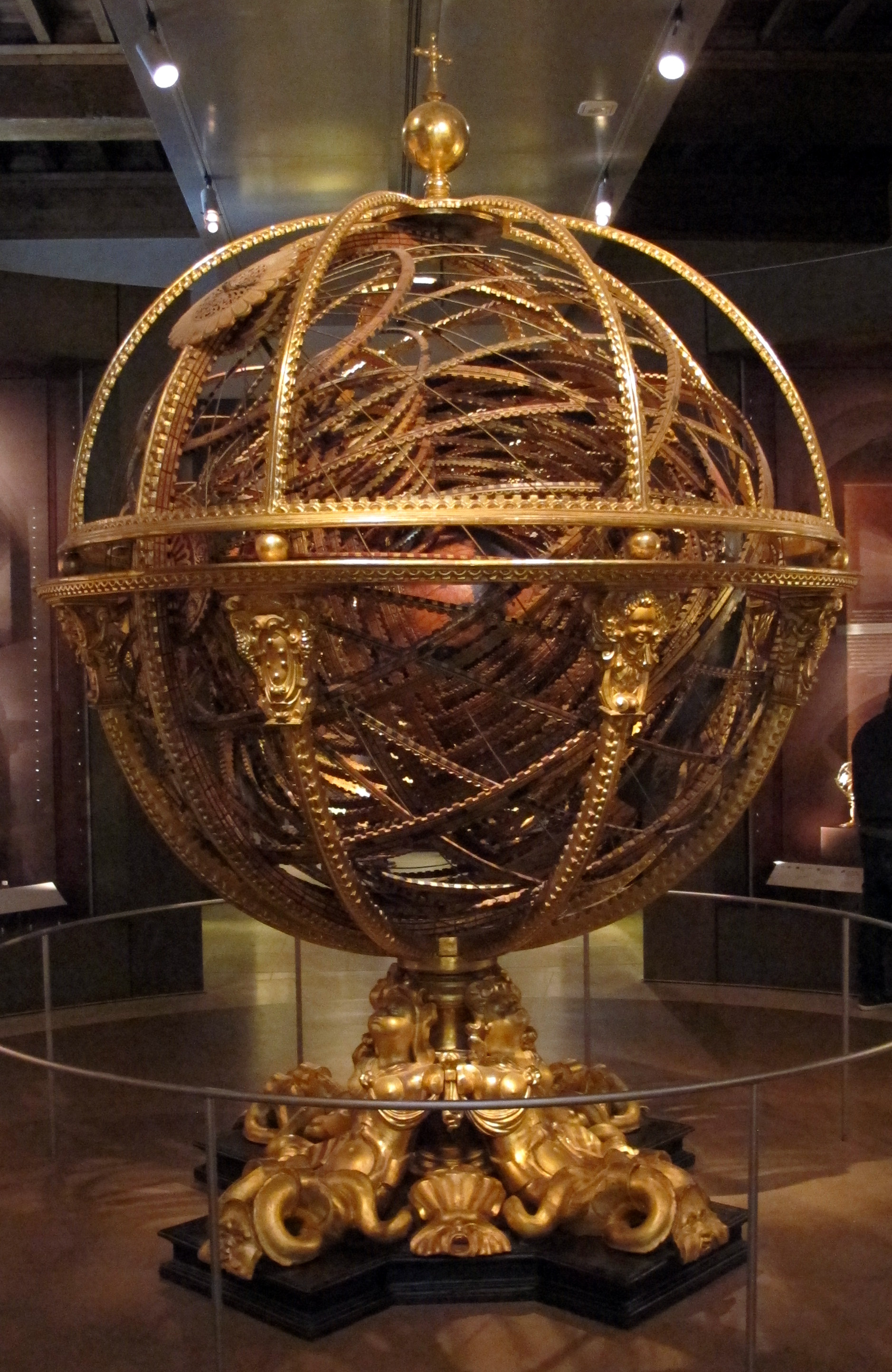 Museo Galileo, Firenze